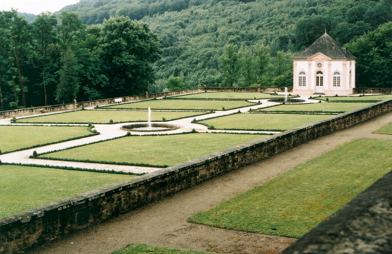 Schloss Weilerbach bei Bollendorf, Gartenparterre des Schlossparks